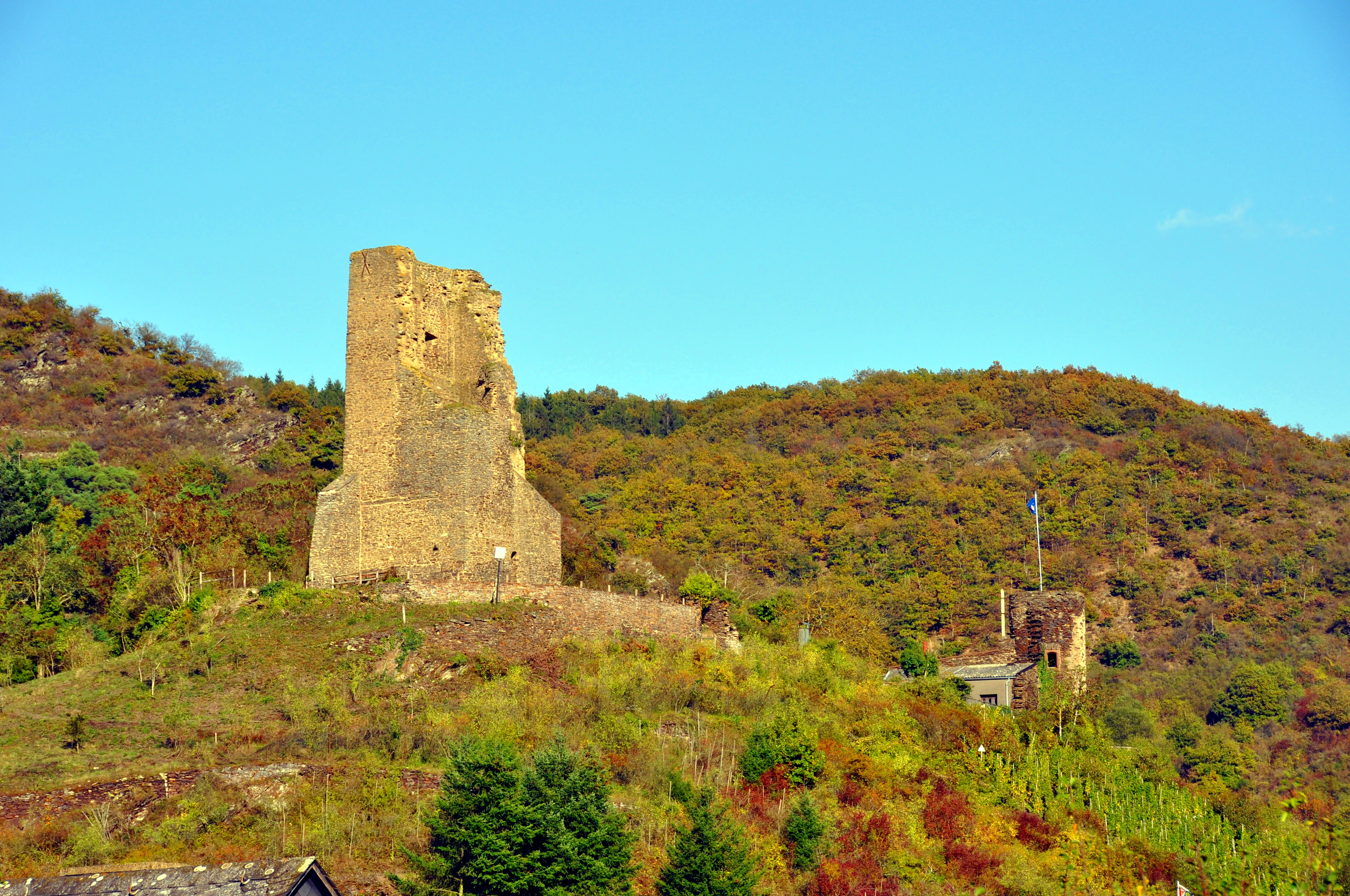 Burg Coraidelstein, Klotten